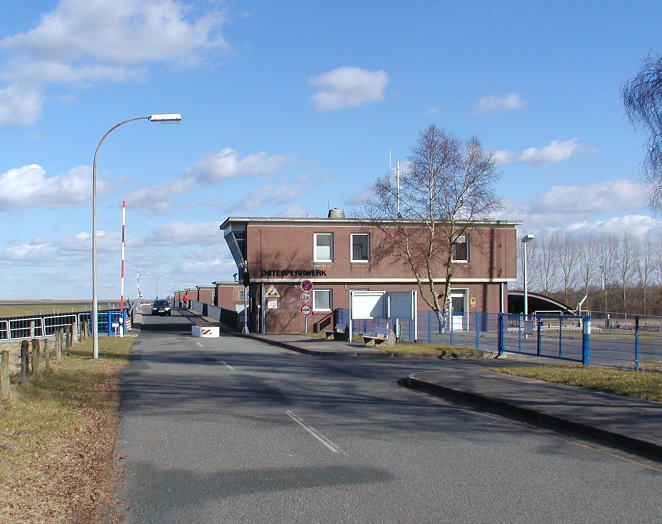 Das Ostesperrwerk